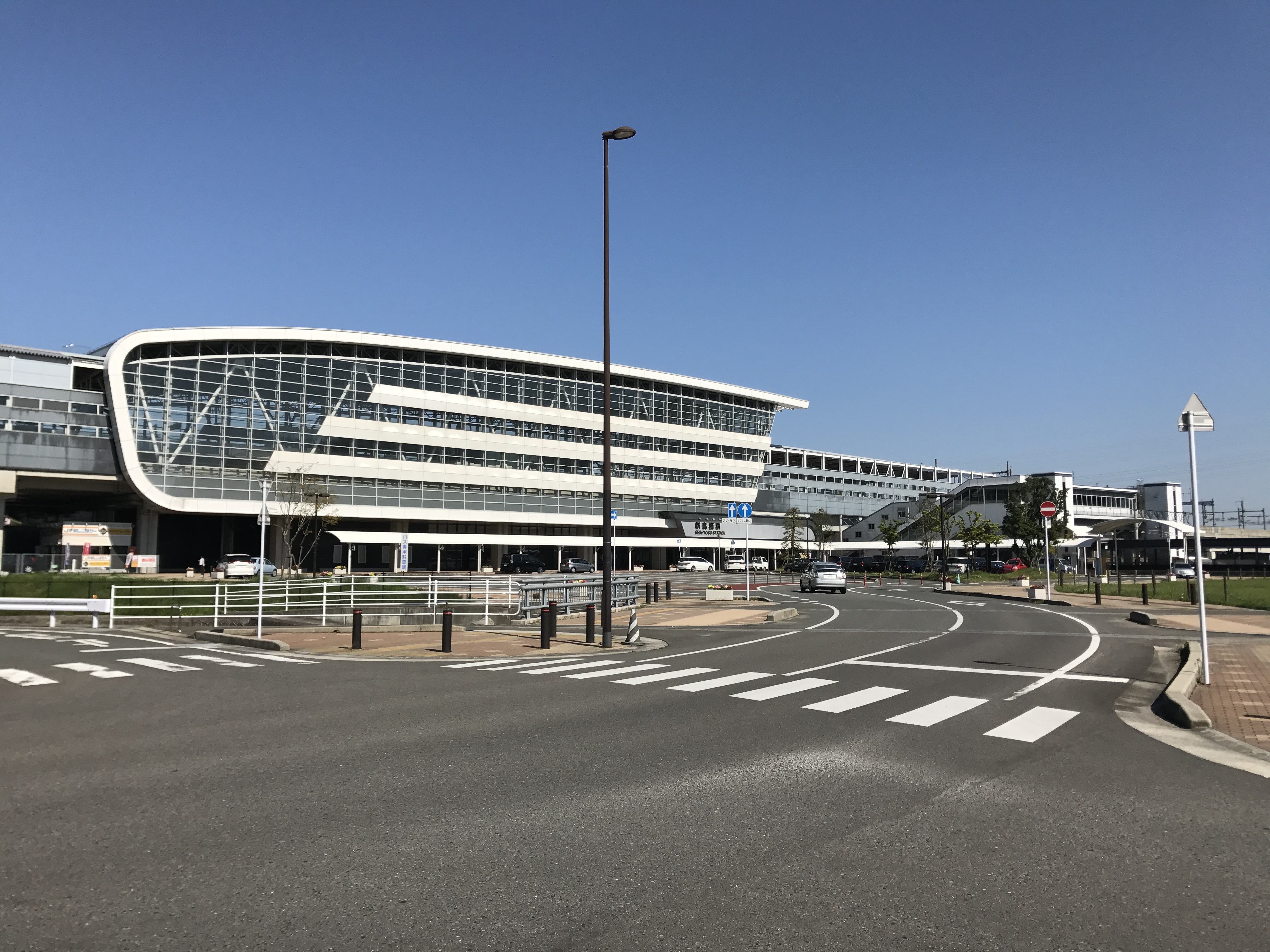 新鳥栖駅駅舎